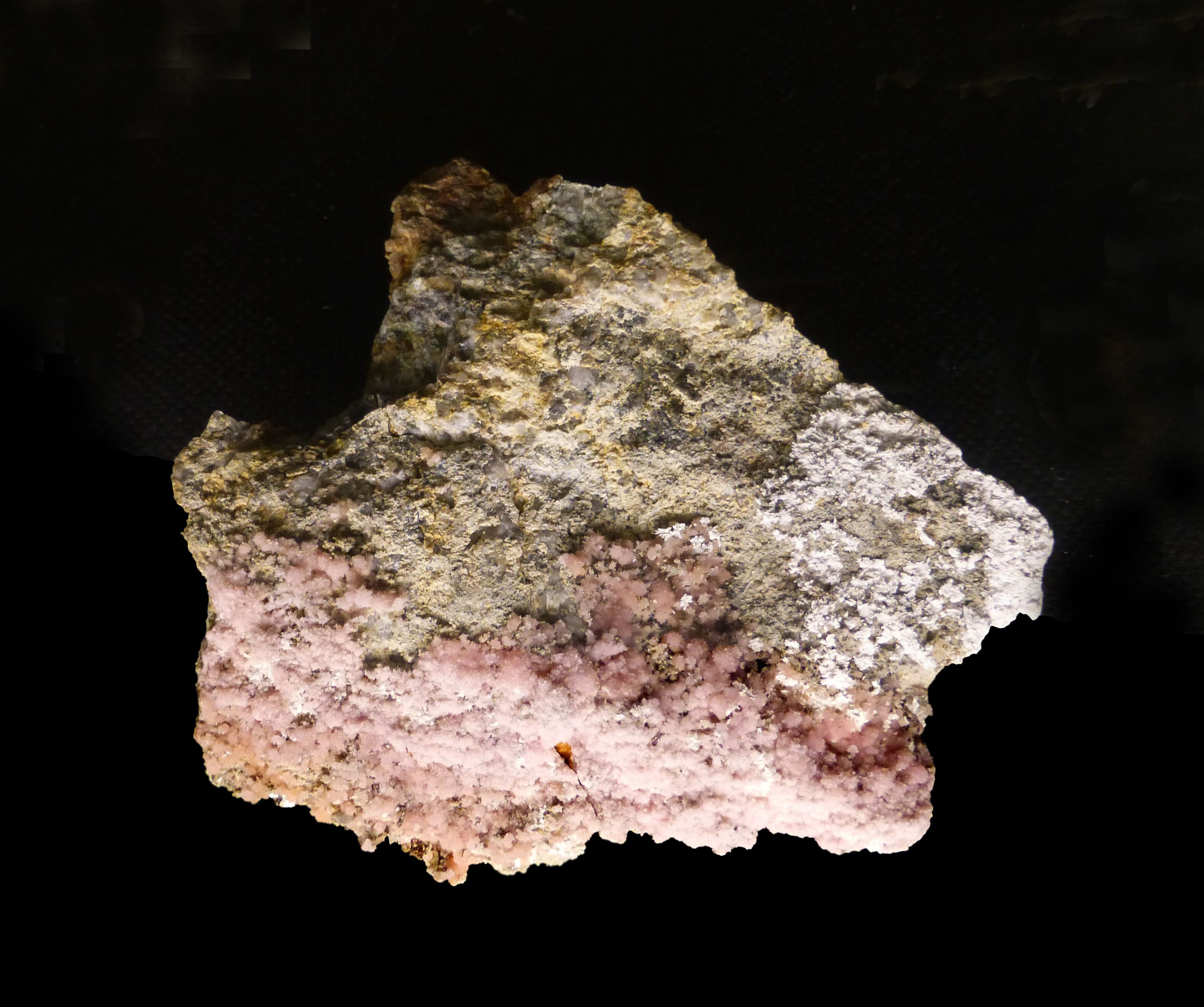 Fluckite (Mine Giftgrube, Neuenberg, Sainte-Marie-aux-Mines, Haut-Rhin). Musée de minéralogie de Strasbourg